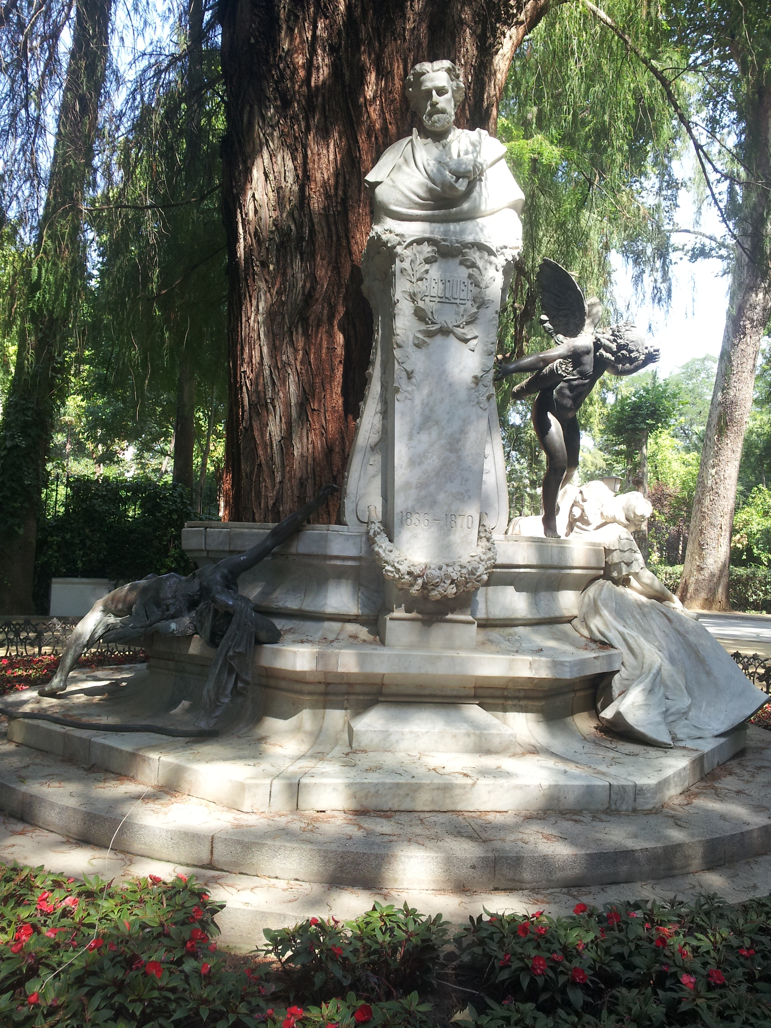 Monumento a Gustavo Adolfo Bécquer en el parque de María Luisa (Sevilla); Representación del "amor ilusionado", el "amor poseído" y el "amor perdido" a la derecha del busto del Poeta según el observador; a la izquierda del busto, representación del "amor herido".